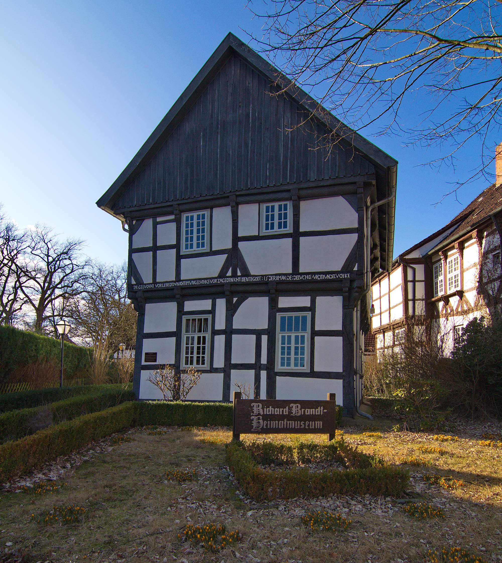 Das Kavaliershaus von 1629 in Bissendorf (Wedemark), Niedersachsen, Deutschland enthält heute das Richard-Brandt-Heimatmuseum.